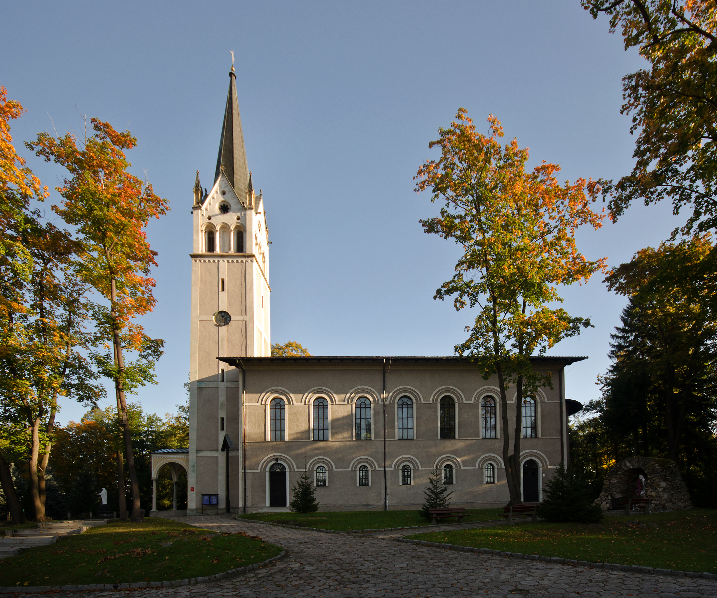 Mysłakowice, ul. 1-go Maja, - kościół parafialny Najświętszego Serca Pana Jezusa, d. ewangelicki